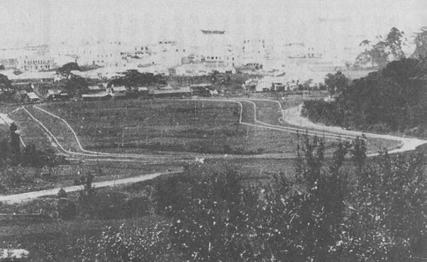 ヒョーゴレースクラブ 競馬場遠景